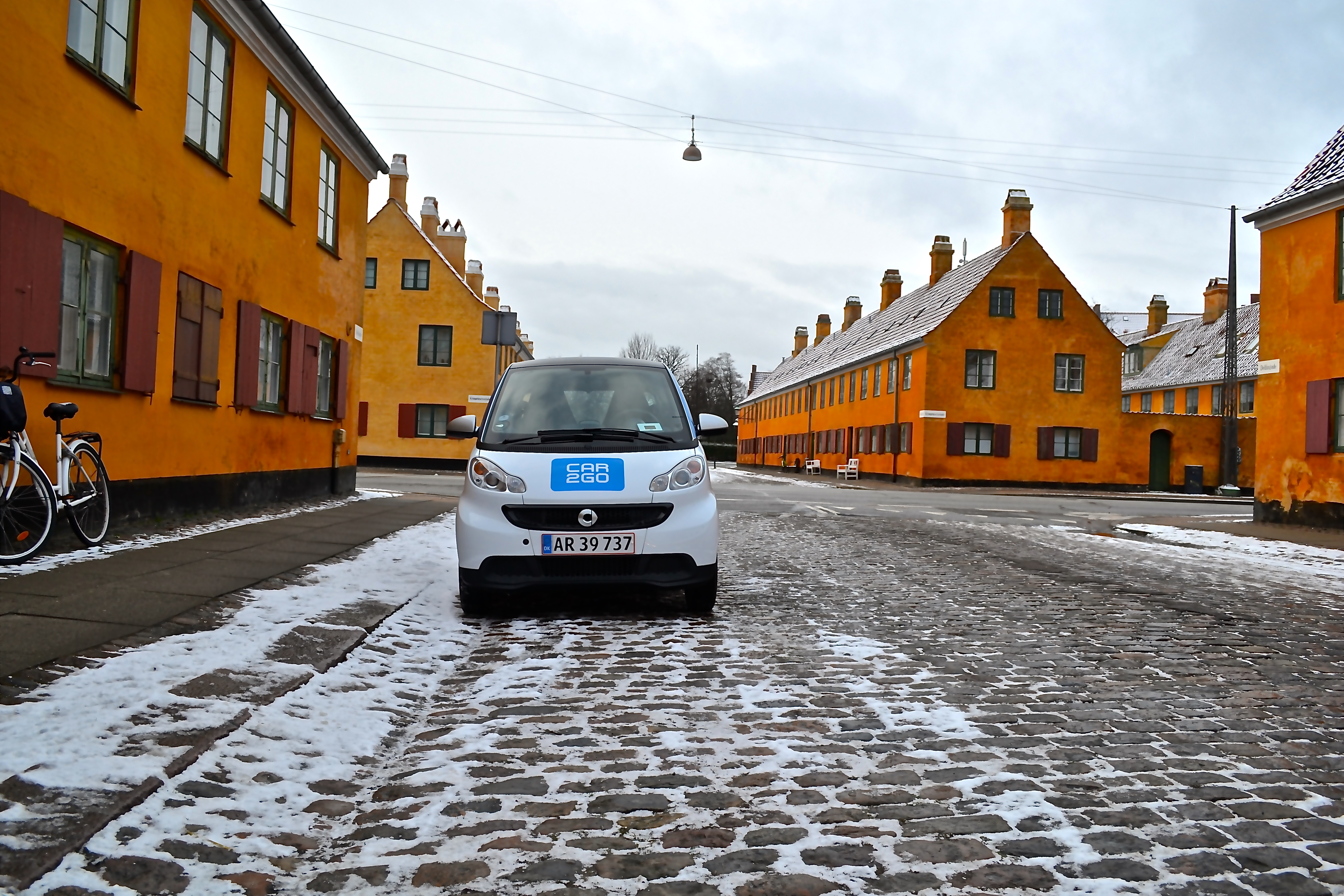 En car2go fotograferet ved Nyboders gader